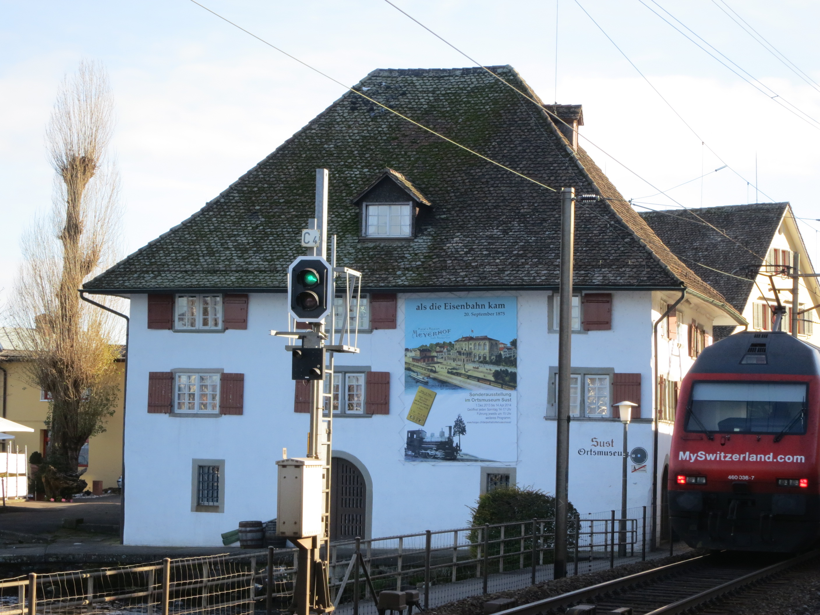 Sust, Horgen, Schweiz